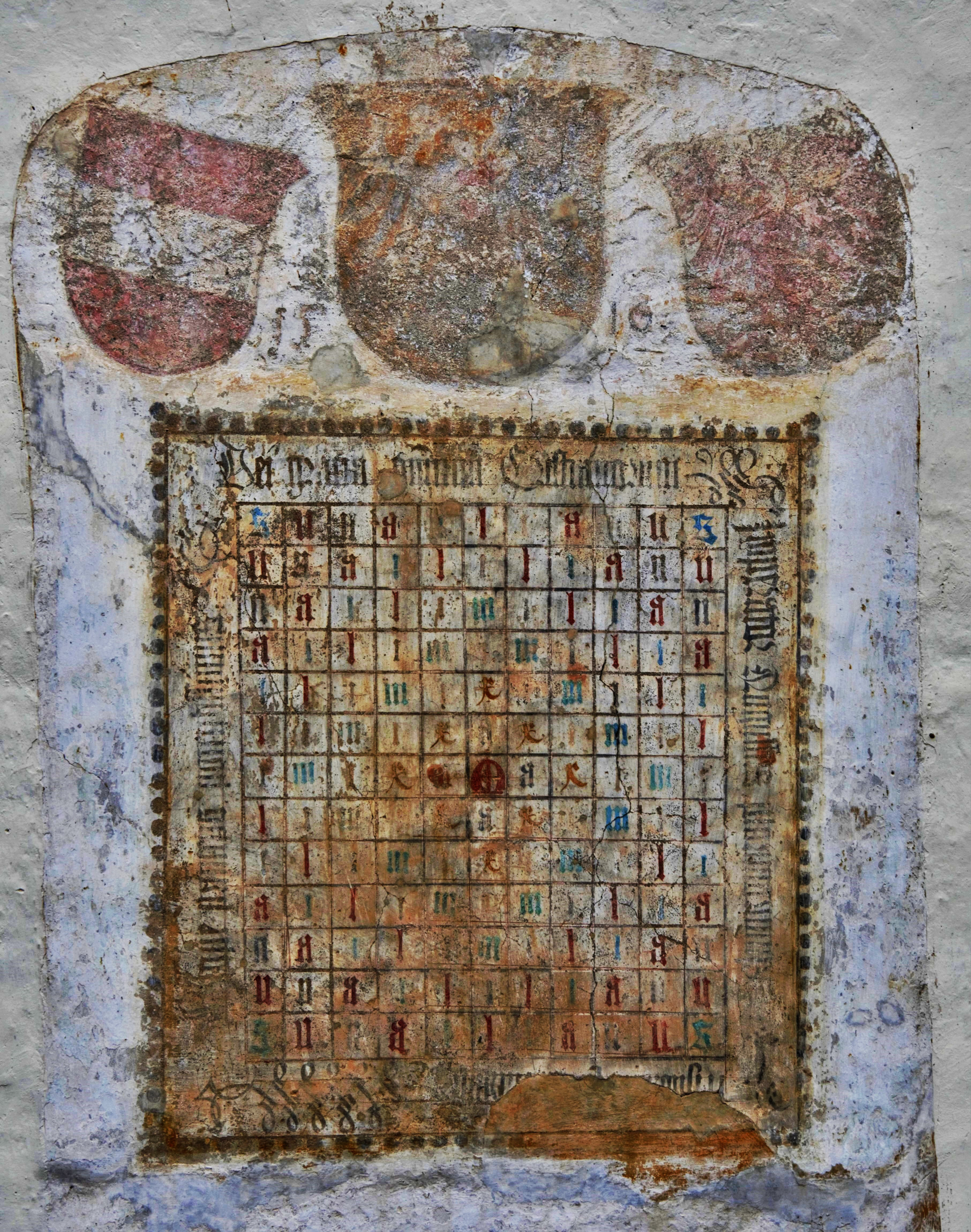 Affresco del 1516 raffigurante un "cruciverba" con il nome di Maximilianus I d'Asburgo, che si trova all'interno della corte del Museo degli Usi e Costumi della Gente Trentina